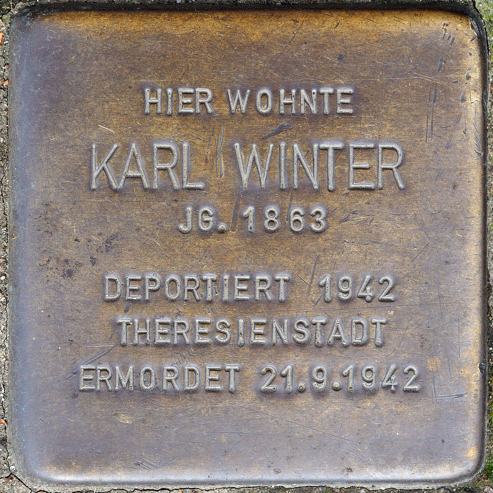 Stolpersteine Korschenbroich: Winter, Karl